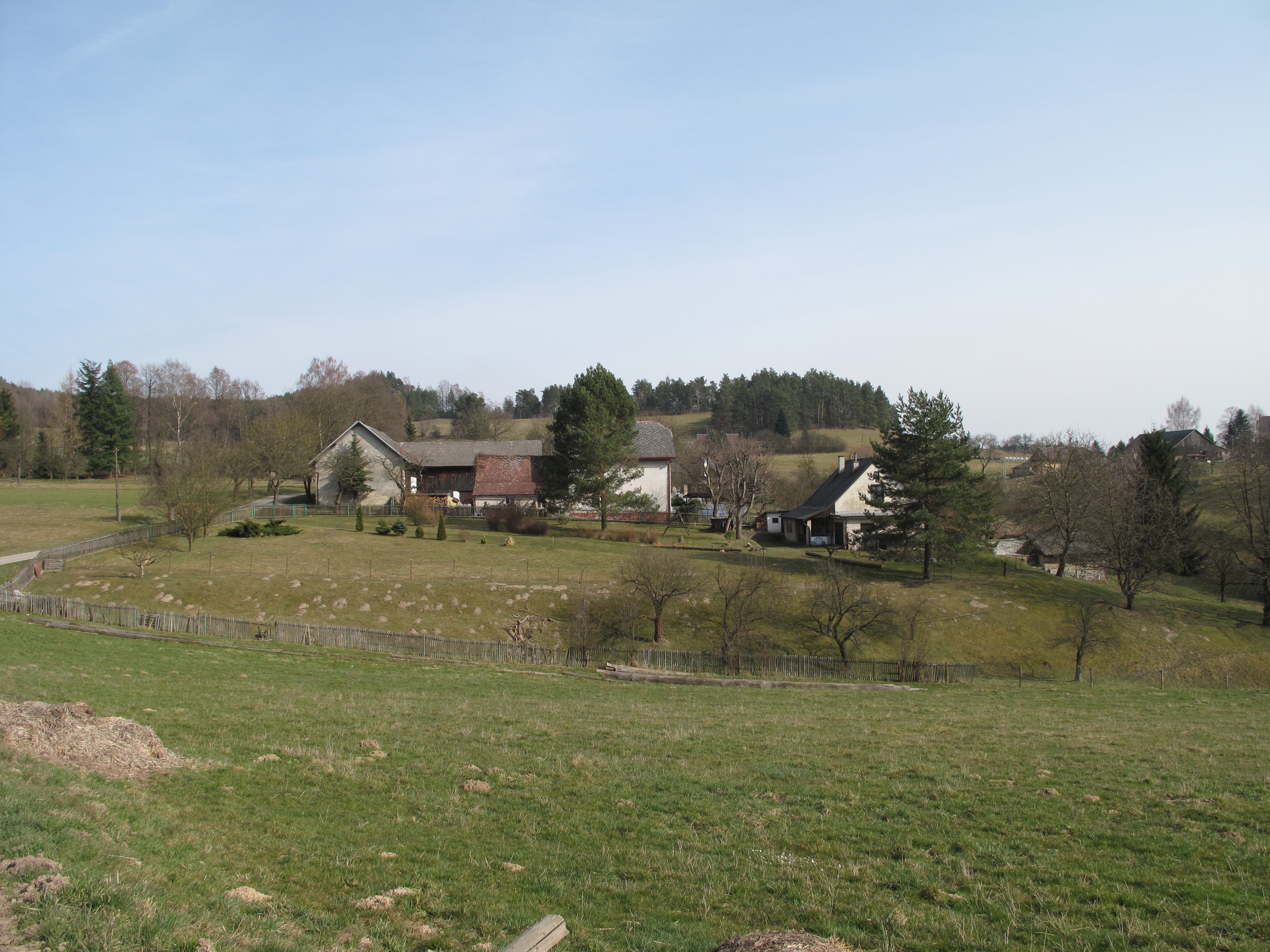 Domy a zahrady v Dehtárech. Okres Liberec, Česká republika.